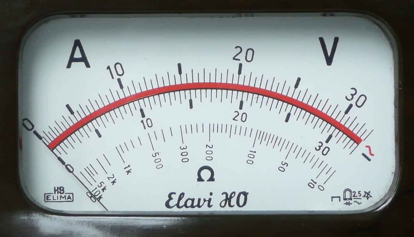 Skalen eines Analogmultimeters. 0-33 A und V, getrennt für Gleich- und Wechselstrom. Rücklaufende Skale für Widerstand in Ohm. rechts unten Symbole für: Gebrauchslage waagrecht, Drehspulinstrument, Gleichrichter, Klasse 2,5 (+/-2,5% Genauigkeit), für Gleich und Wechselstrom, (fünfzackiger Stern mit "2") Prüfspannung 2000 V